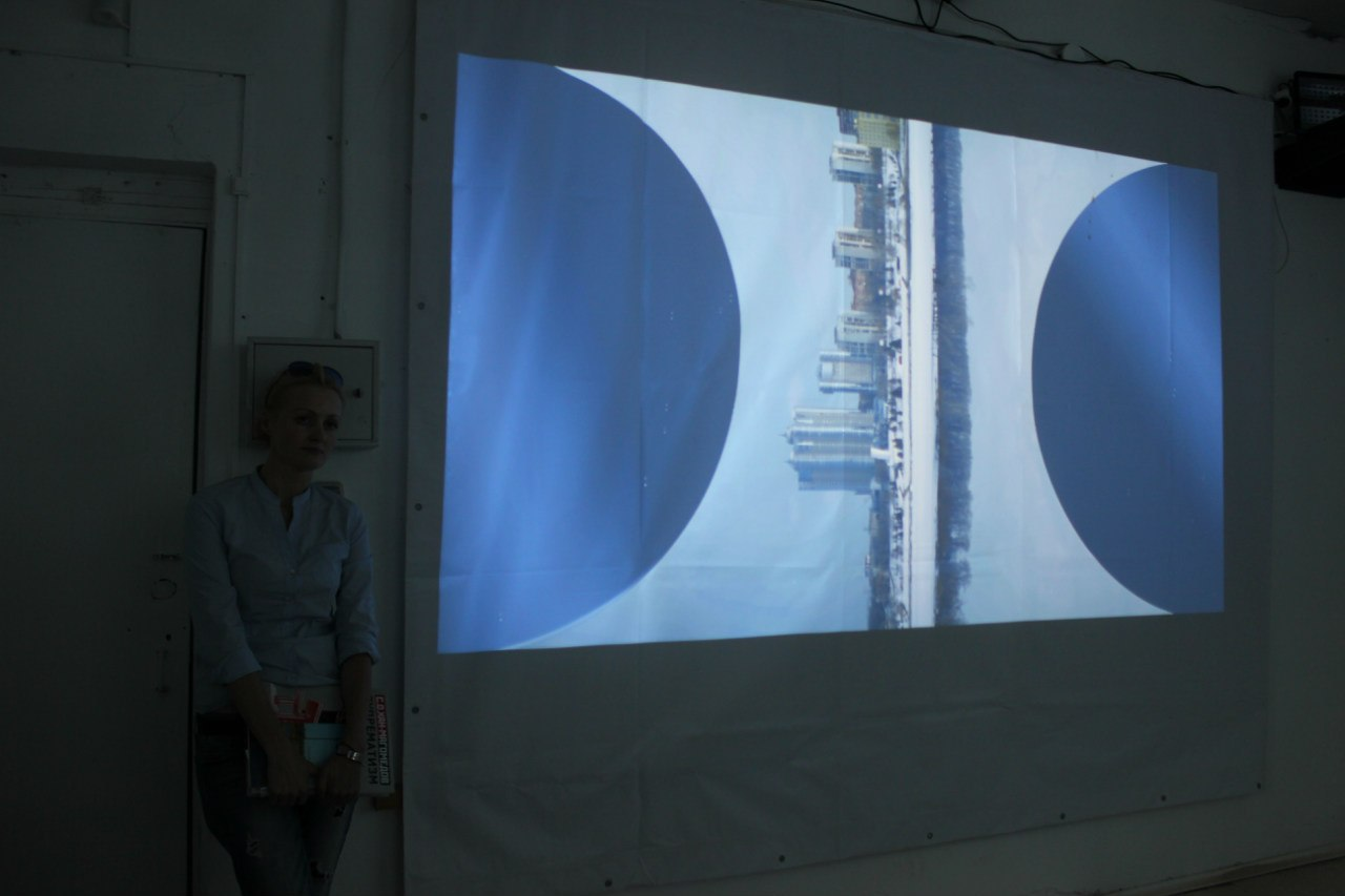 Владимир Логутов фестиваль пять способов выйти на свободу Самарский литературный музей 2013